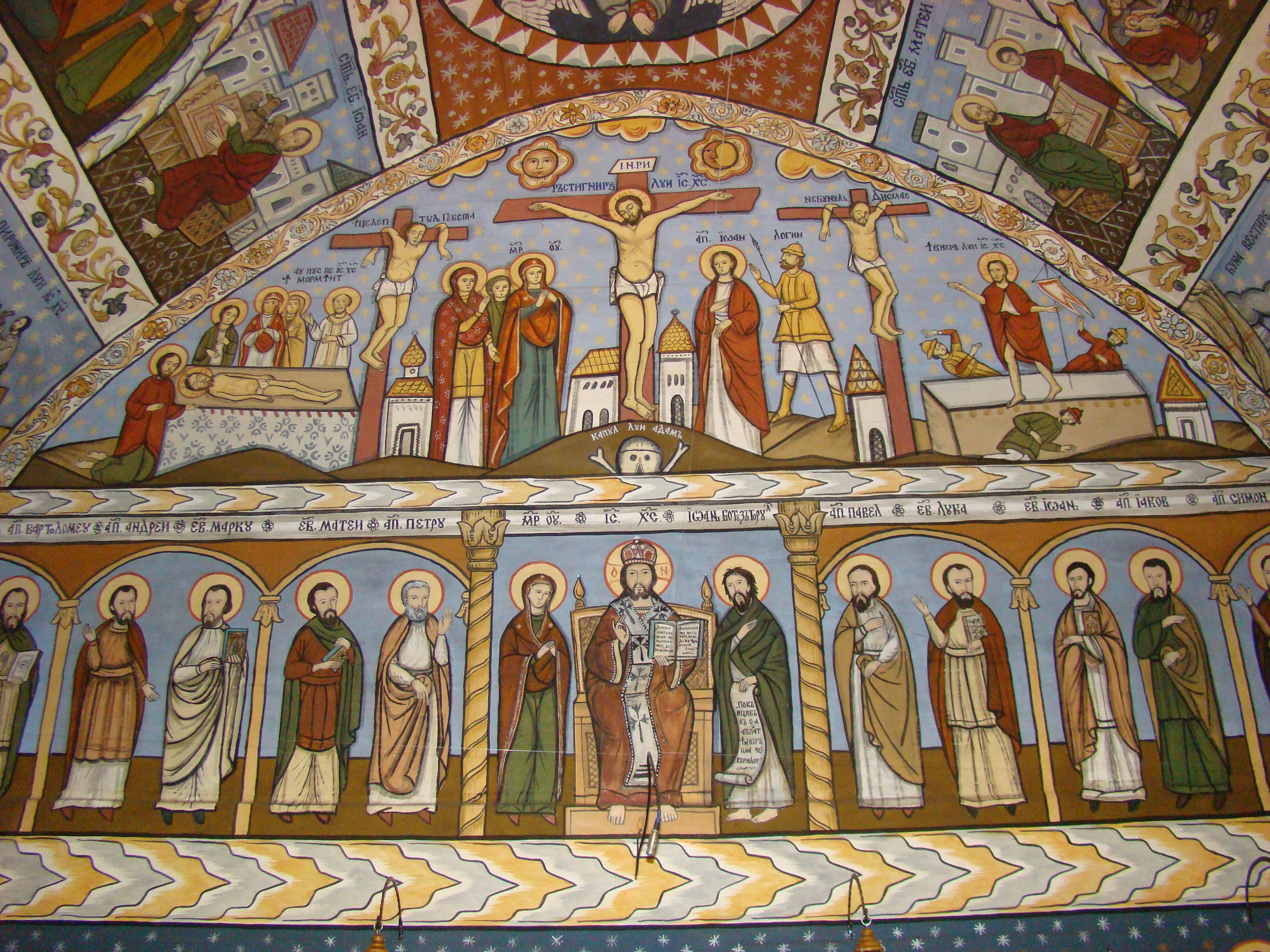 Biserica de lemn „Sf. Trei Ierarhi" din Ghighișeni mutată la Cucuceni